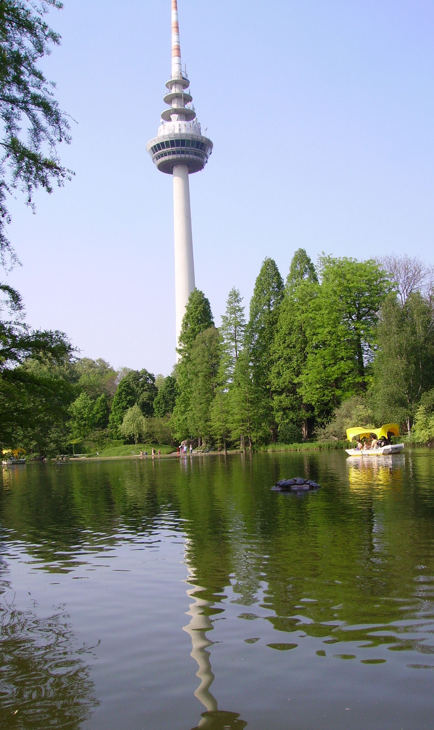 Luisenpark in Mannheim, Germany